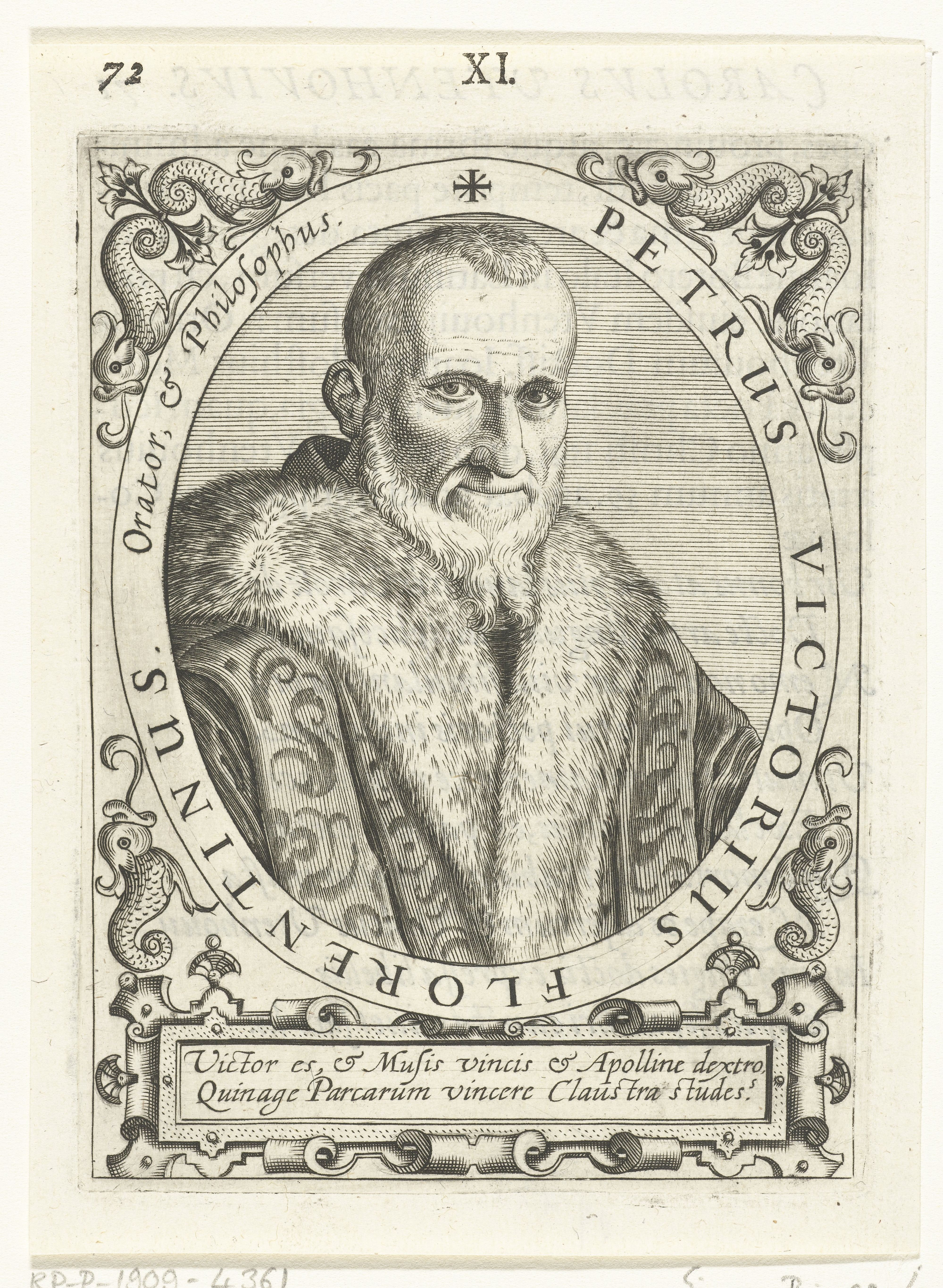 IdentificatieTitel(s): Portret van Pietro VettoriPetrus VictoriusObjecttype: prent boekillustratie Objectnummer: RP-P-1909-4361Catalogusreferentie: Singer 32067Opschriften / Merken: verzamelaarsmerk, verso, gestempeld: Lugt 2228Omschrijving: Portret van de humanist Pietro Vettori, in ovaal met randschrift. Onder het portret een lofdicht.VervaardigingVervaardiger: prentmaker: Cornelis Galle (I)naar ontwerp van: Jean Jacques Boissard (mogelijk)Datering: ca. 1597 - ca. 1599 en/of 1669Fysieke kenmerken: gravureMateriaal: papier Techniek: graveren (drukprocedé)Afmetingen: plaatrand: h 140 mm × b 100 mmToelichtingGemaakt voor: J.J. Boissard, Icones virorum illustrium doctrina &c eruditione praestanti um contines. Frankfurt am Main: de Bry, 1597-1599. Opnieuw gebruikt in: J.J.Boissard, Bibliotheca chalcographica, hoc est Virtute et eruditione clarorum Virorum Imagines. Heidelberg: Clemens Ammon, 1669. Dl. 1-5 (te herkennen aan de toegevoegde signatuur in de rechter onderhoek: 3F4).OnderwerpWie: Piero VettòriVerwerving en rechtenVerwerving: aankoop 1905Copyright: Publiek domein